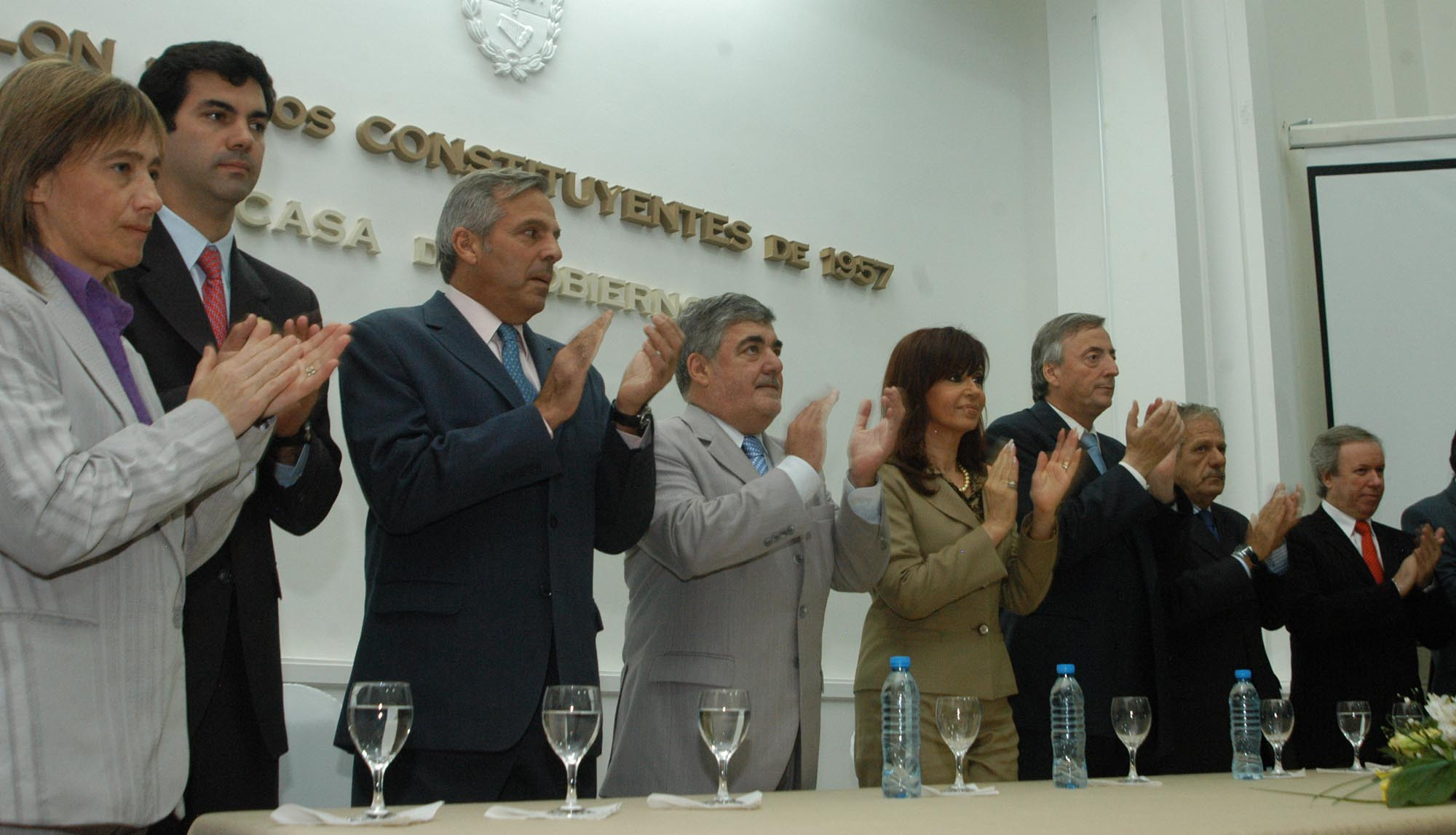 La Presidenta junto al ex presidente Néstor Kirchner y gobernadores en el acto en Chubut.